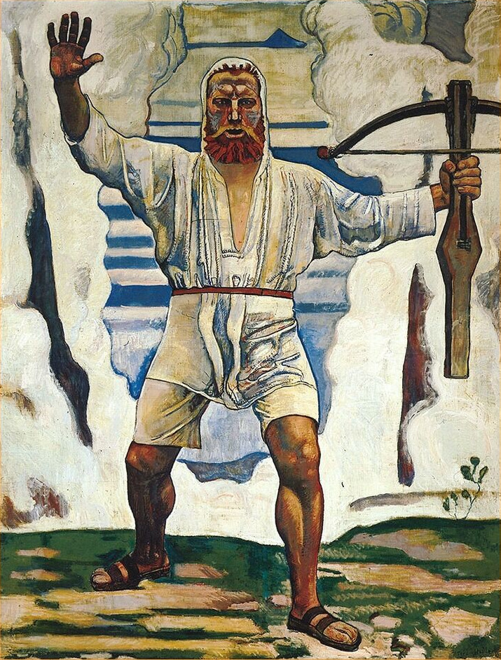 "Wilhelm Tell" (1897), Öl und Tempera auf Leinwand, 255,5 x 195.5 cm, Kunstmuseum Solothurn, Vermächtnis Frau Margrit Kottmann-Müller 1958.